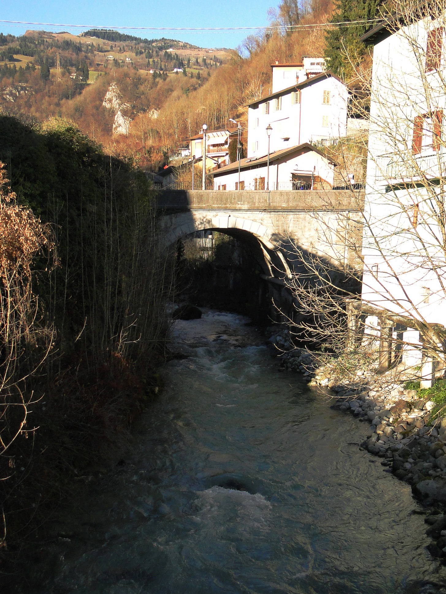 Torrente Nossana, Ponte Nossa (BG)